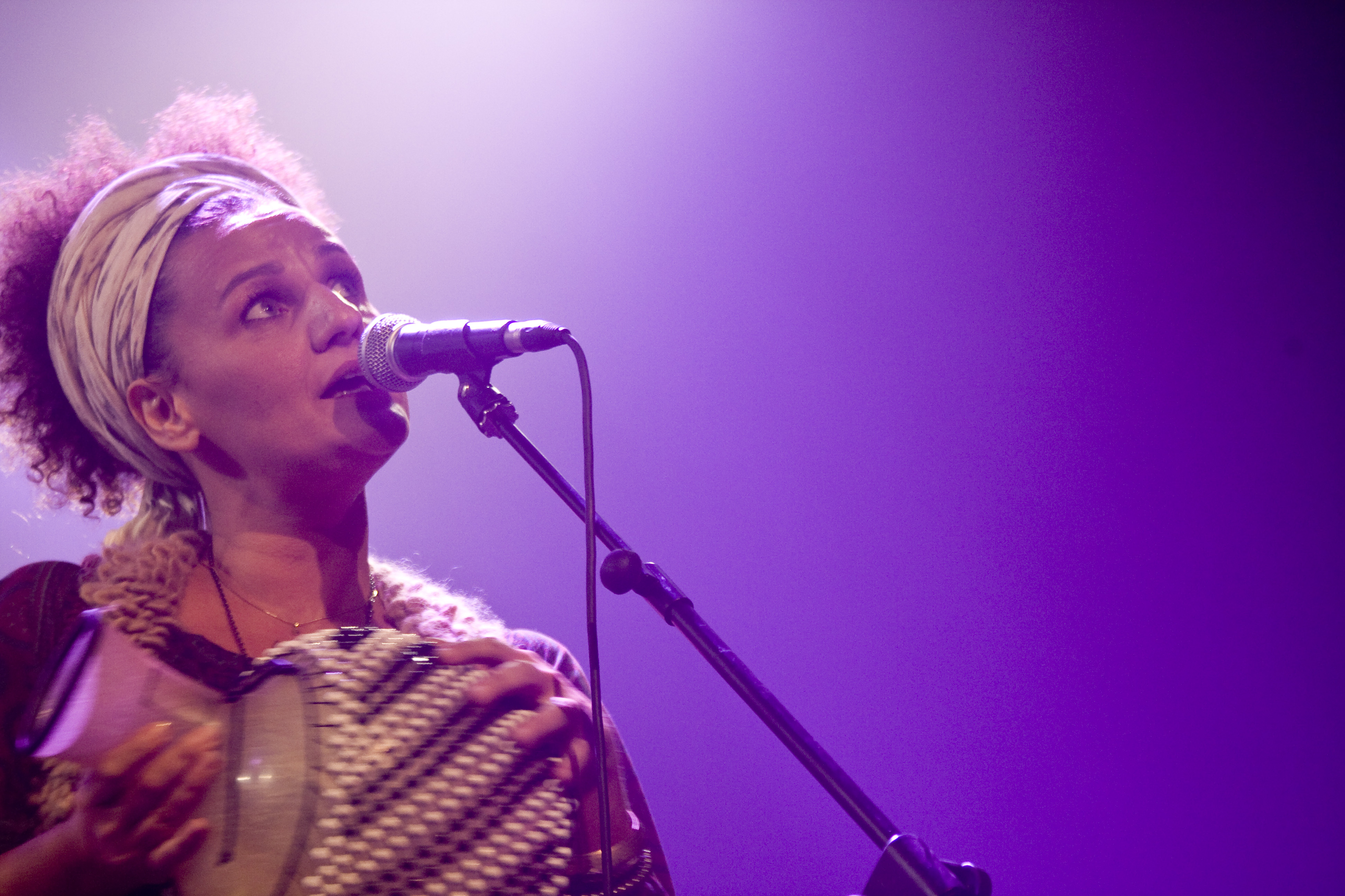 קרולינה בהופעה